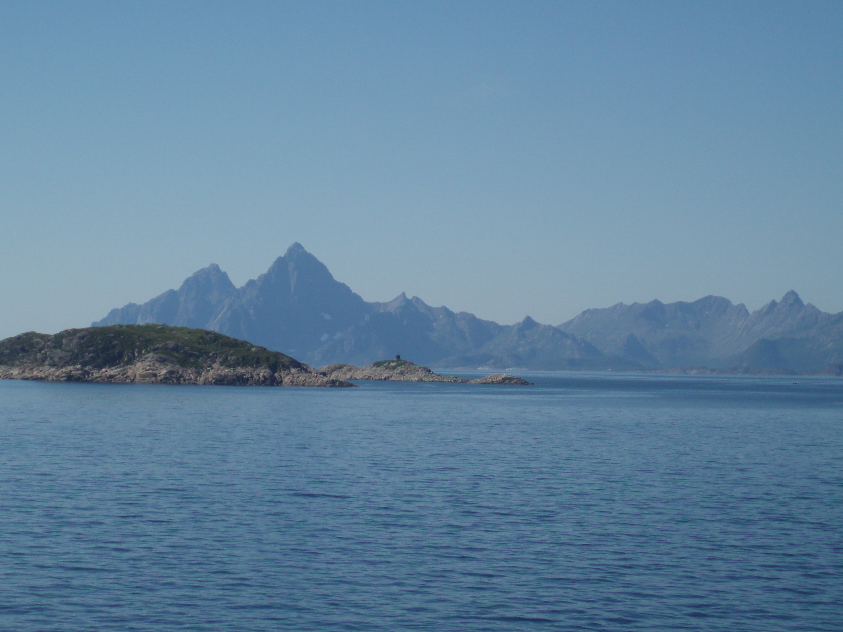 Vestfjorden and Lofoten seen from the ferry between Skutvik and Svolvær.